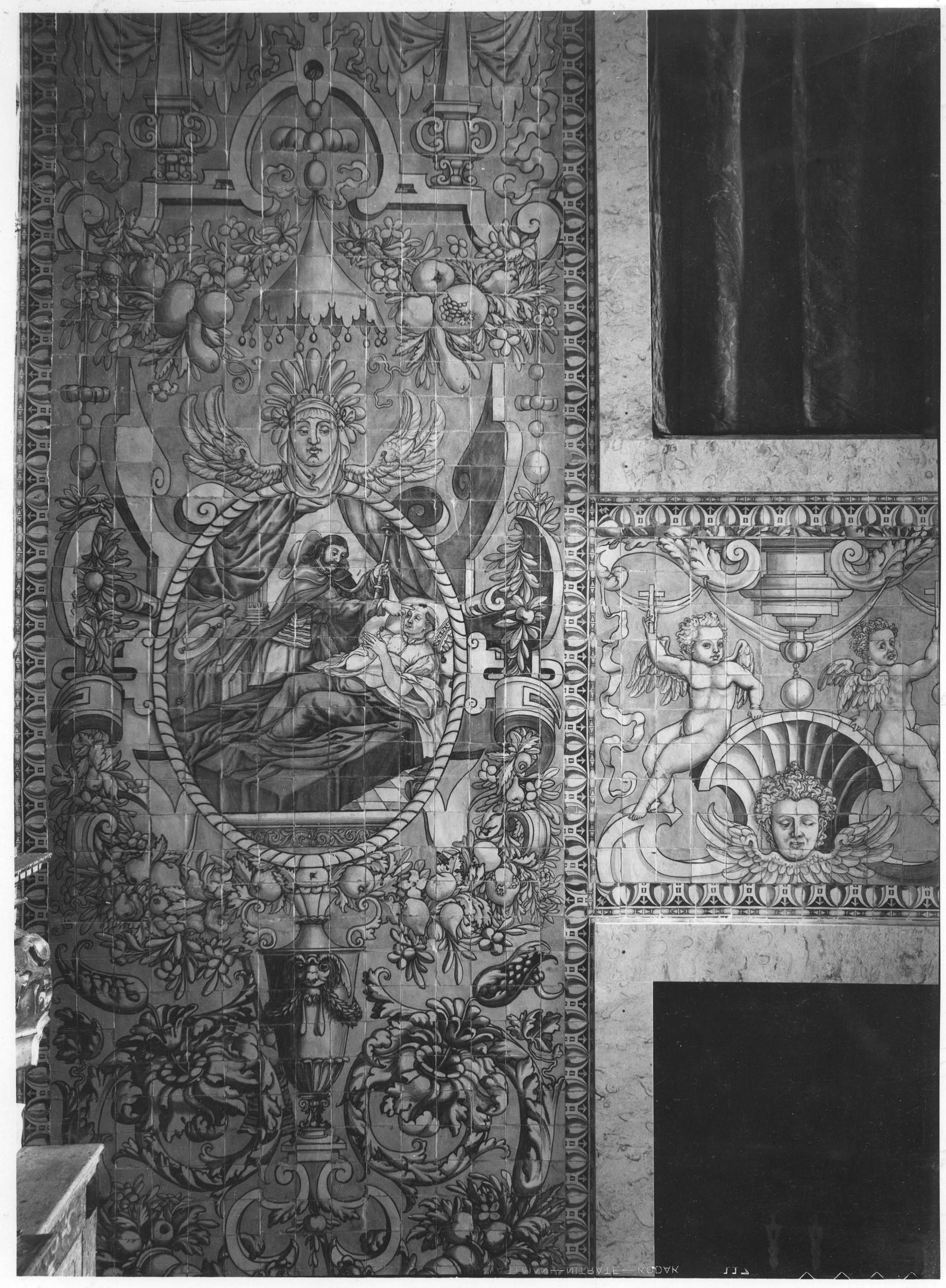 Igreja de São Roque: azulejos ornamentais. Azulejos do século 16. Fotógrafo: João Miguel dos Santos Simões (1907-1972). Data de produção da fotografia original: 1960-1970. [CFT009.1142.ic]